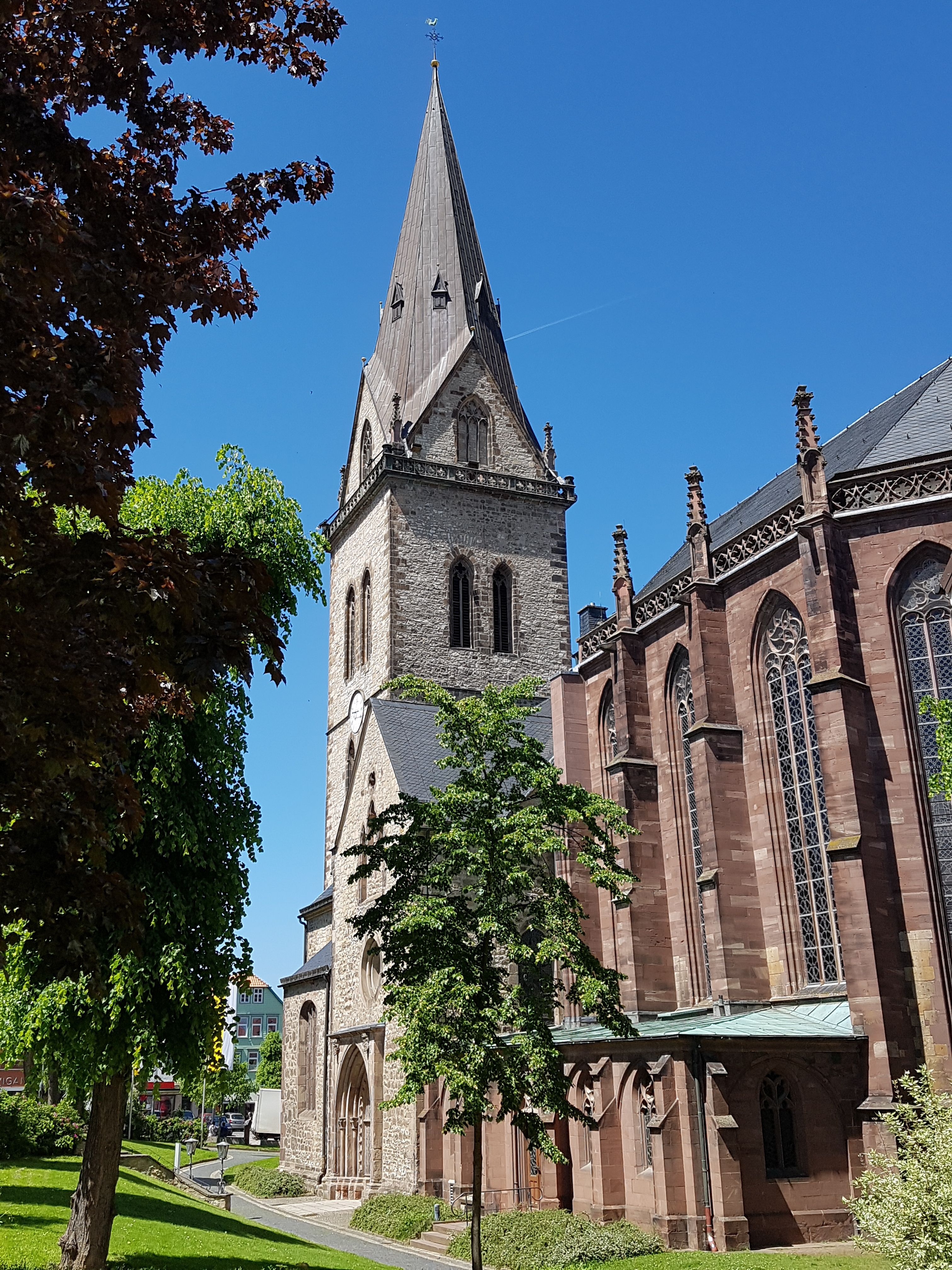 Neustadt-Kirche St. Johannes Baptist in Warburg